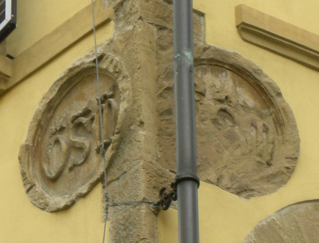 Via de' calzaiuoli, palazzo della compagnia di orsanmichele, stemmi osm 2